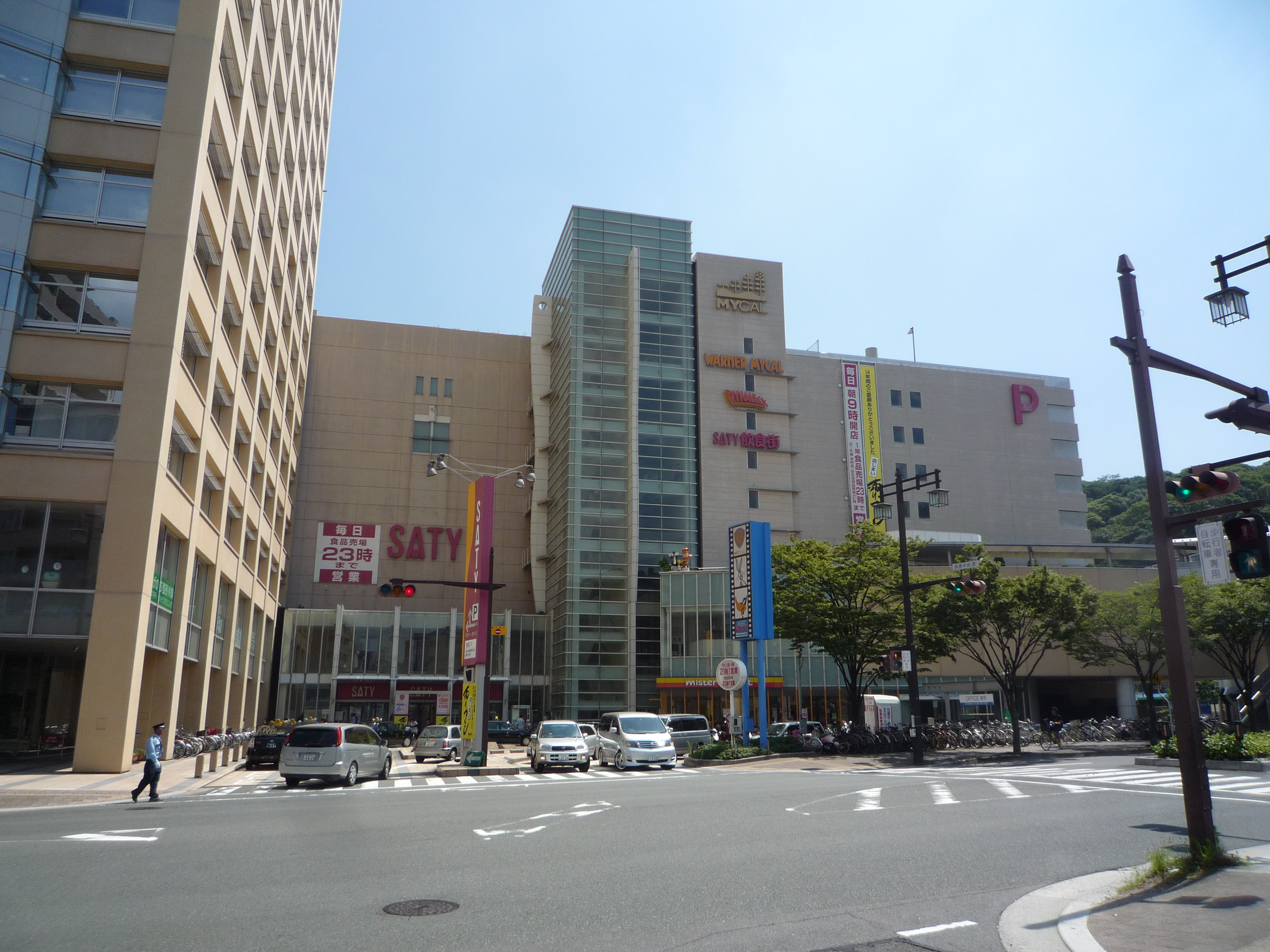 広島サティ